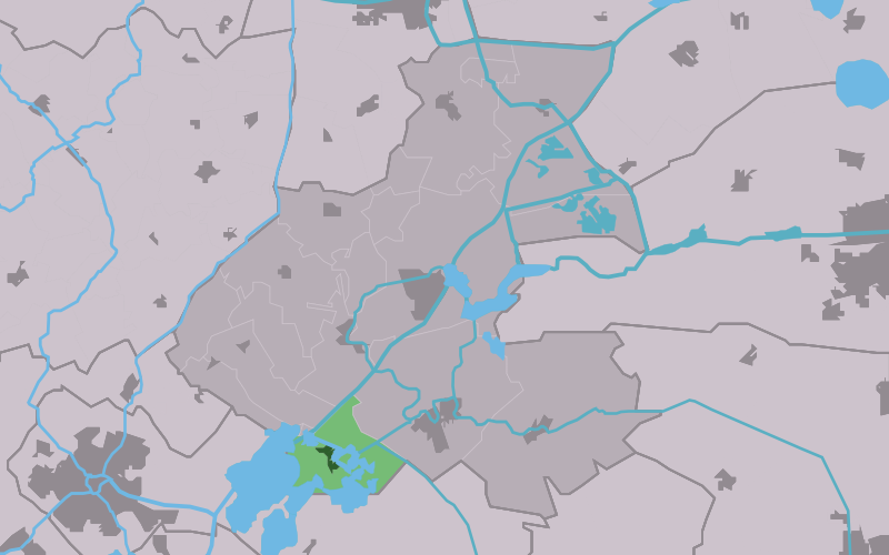 Kaartsje fan himrik fan Terherne